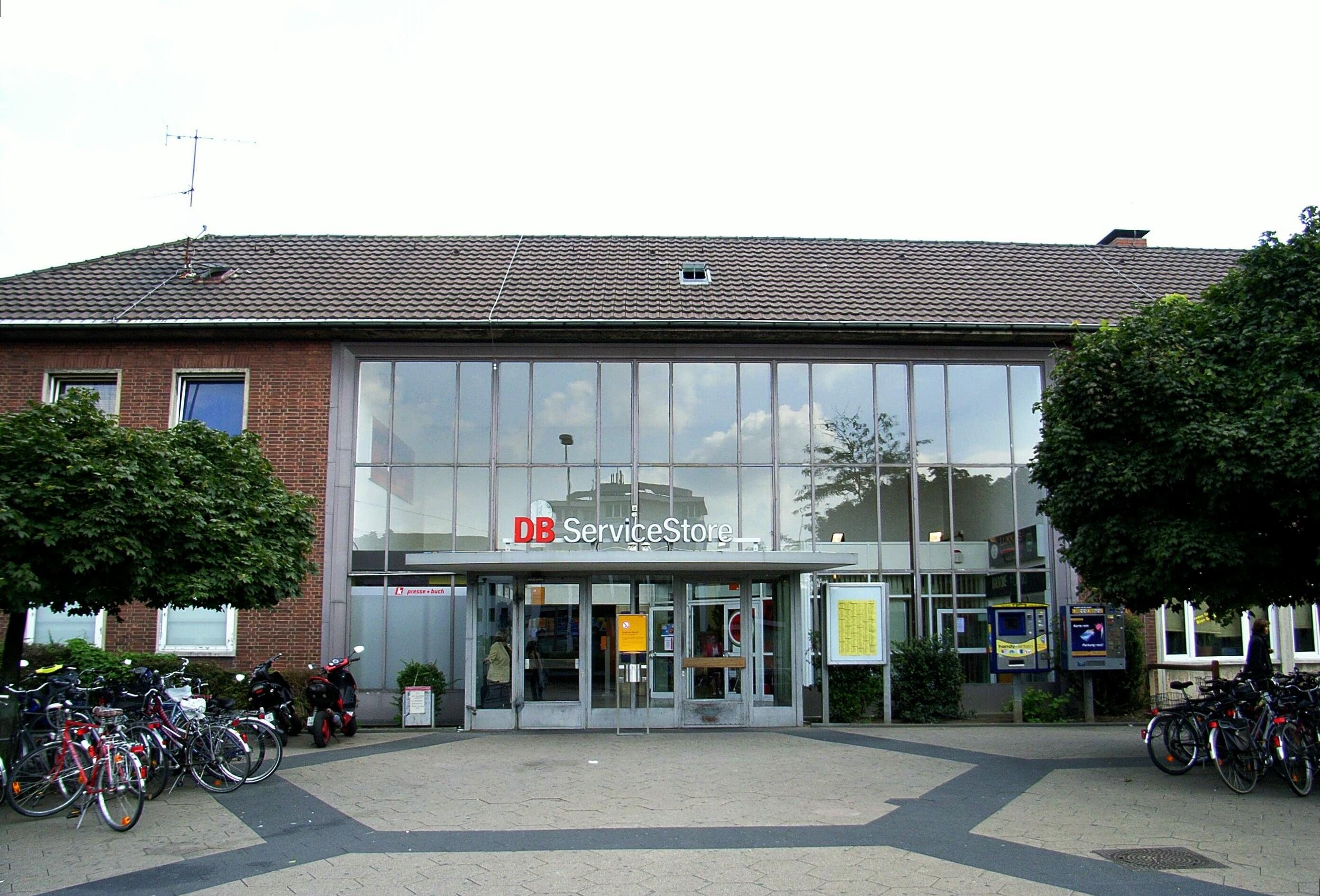 Dieses Bild zeigt das Bahnhofsgebäude in Dinslaken.